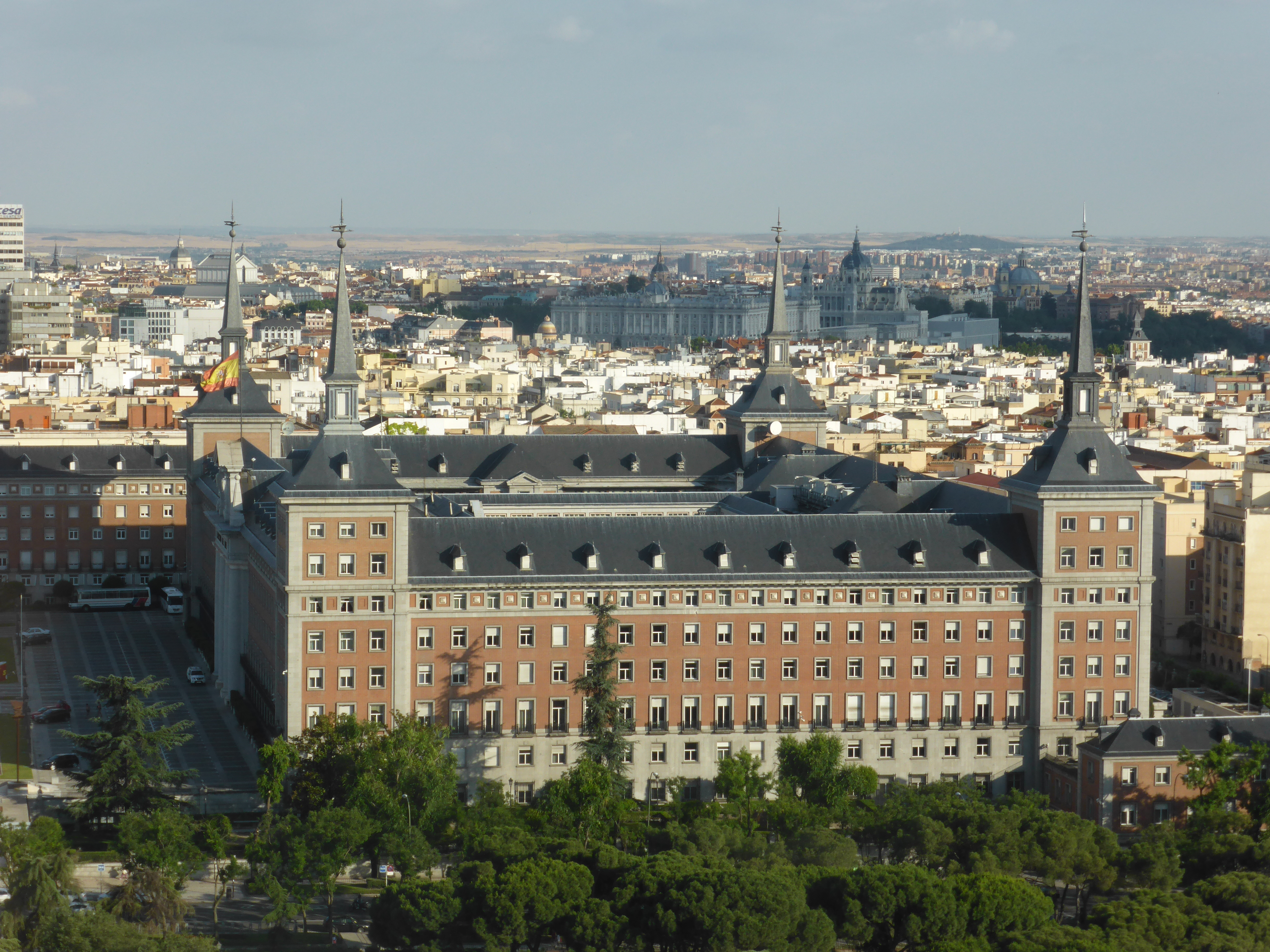 Vista lateral del Cuartel General del Ejército del Aire, de estilo neoherreriano o escurialense. Este inmueble está inspirado en el Monasterio de El Escorial, y también en otros edificios como el Alcázar de Toledo. Fue construido entre los años 1943 y 1958. Puede contemplarse en vista aérea desde el Faro de Moncloa